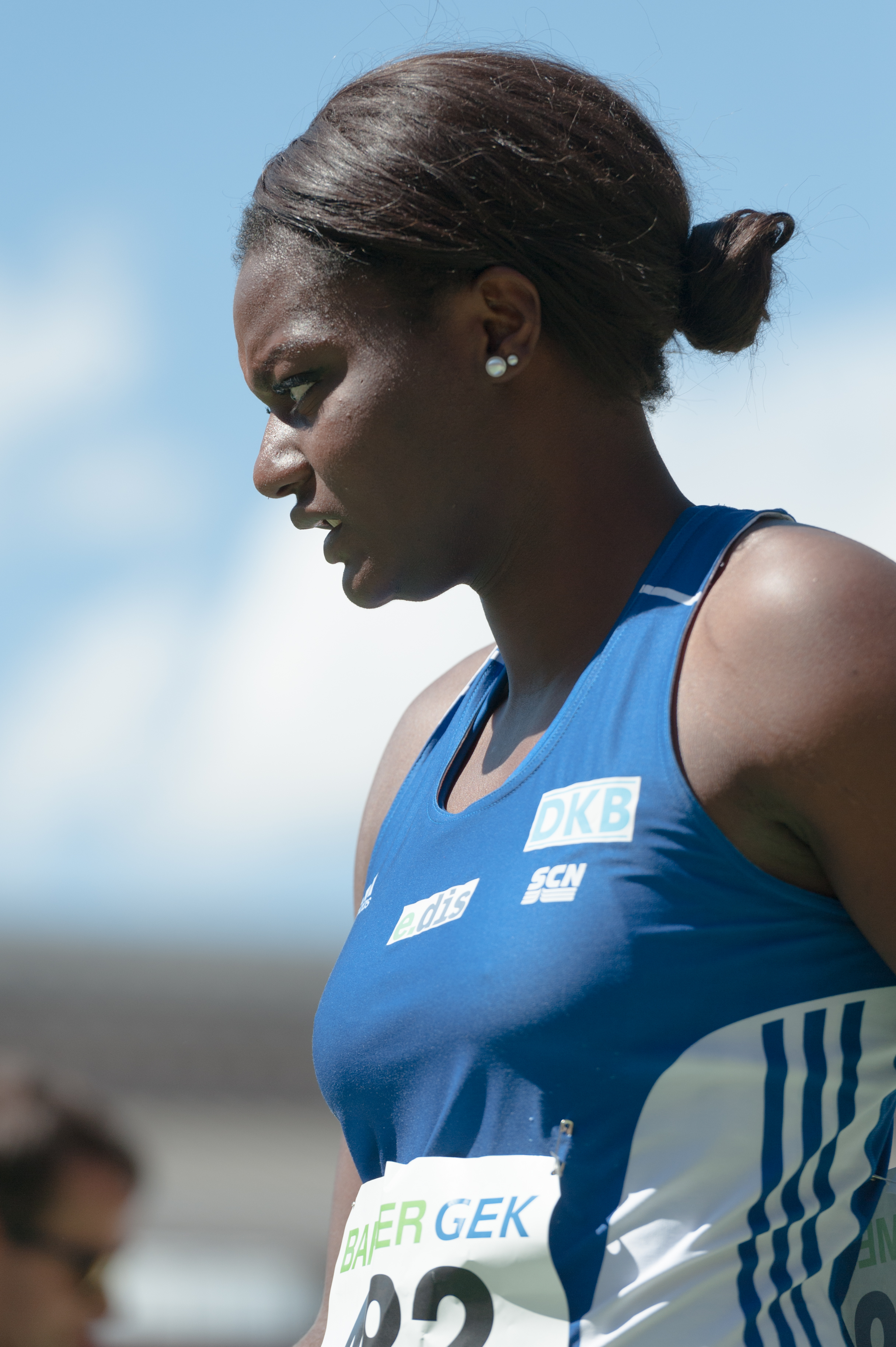 Deutsche Leichtathletik-Meisterschaften 2015: Frauen Diskuswurf - Claudine Vita, SC Neubrandenburg